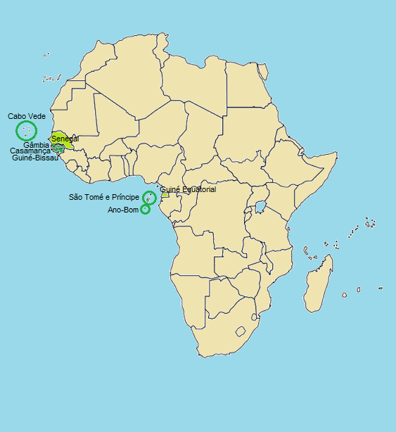 Português do Brasil: Localização dos crioulos afro-portugueses